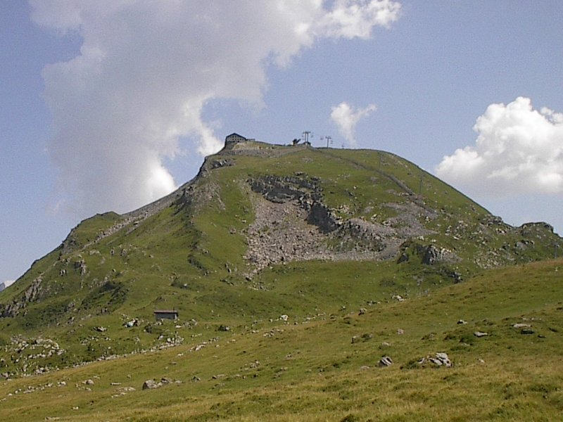 La Pointe des Mossettes Photo J.J.Roland (07.08.2003)